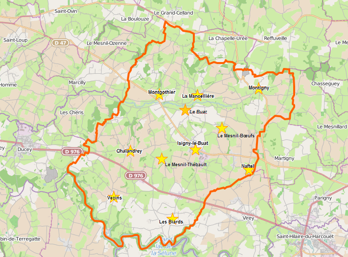 Carte openStreetMap de la commune avec ses communes asscoiées